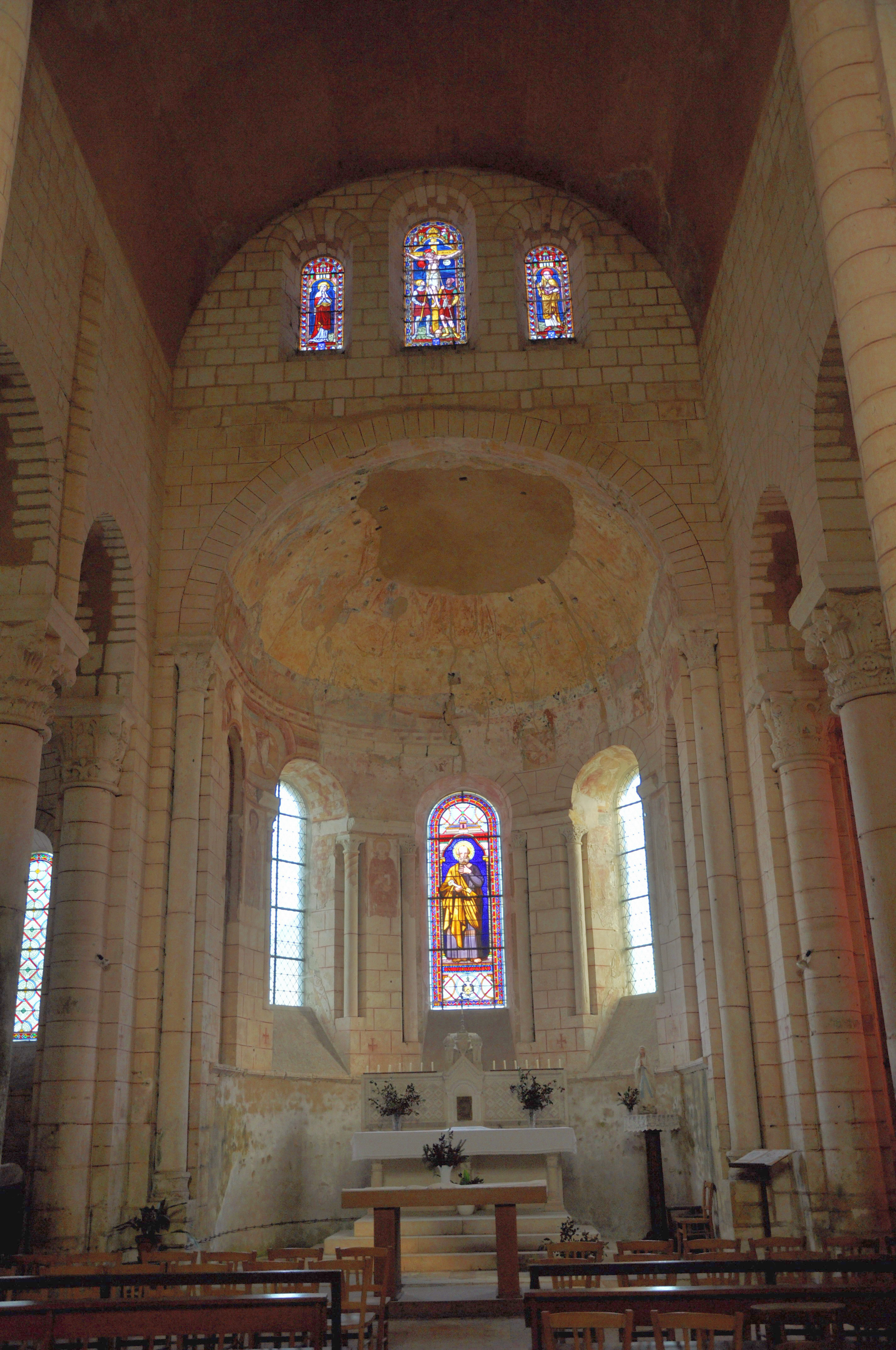 Méobecq (Indre) - Abattiale - Nef centrale.